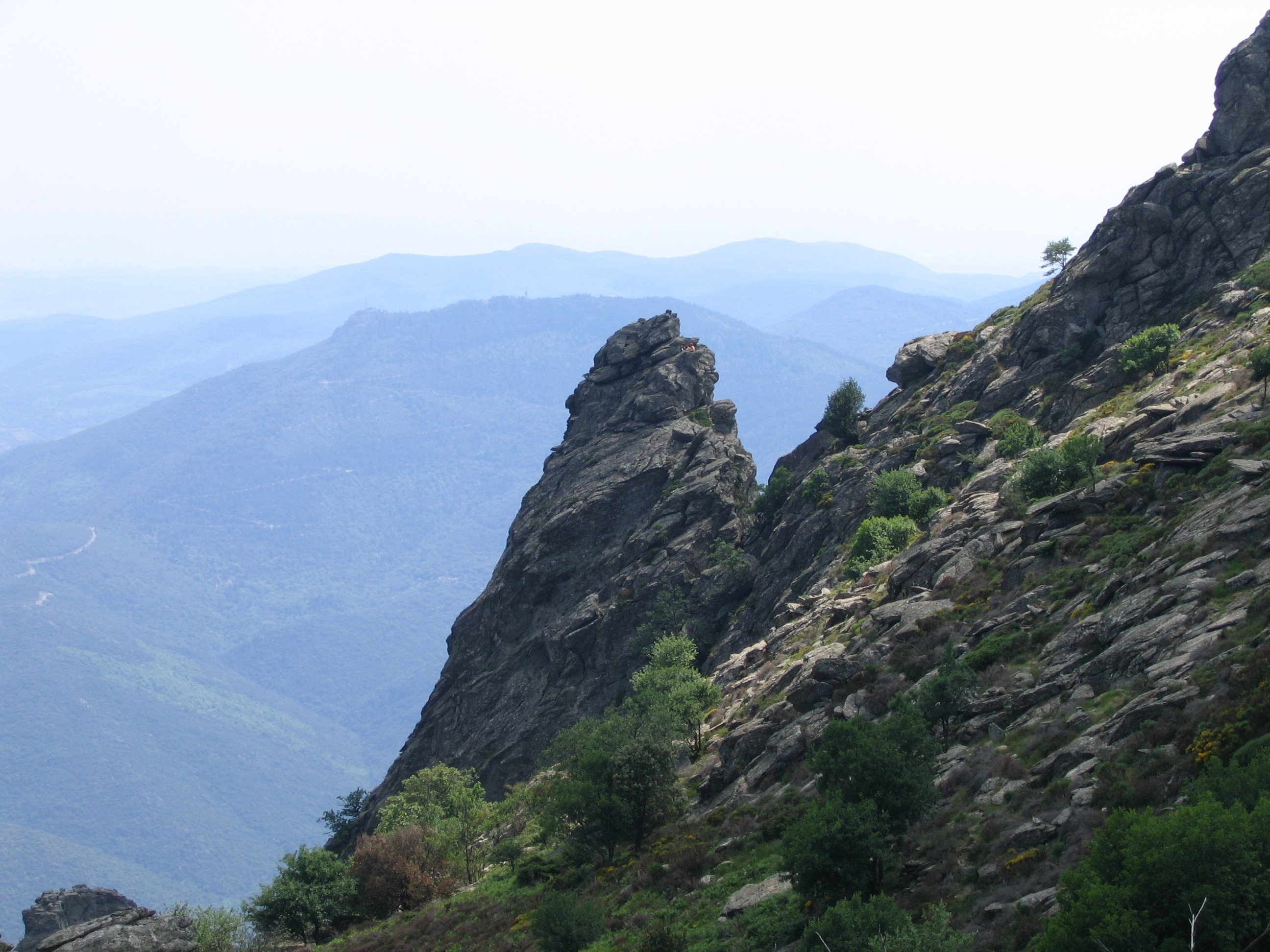 Description: Paysage du Caroux Hérault, France Source: Hugo Soria Licence: GFDL Hugo Soria